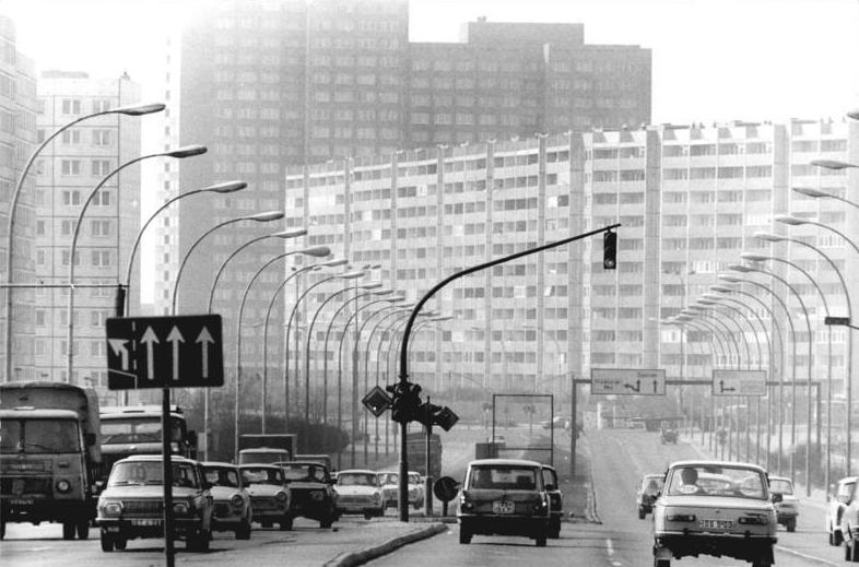 ADN-ZB-Zimmermann-3.4.84-frs-Berlin: Richtiges Einordnen geboten- Blick von der Leninallee auf die Kreuzung Ho-Chi-Minh-Straße, in Richtung zum Zentrum.